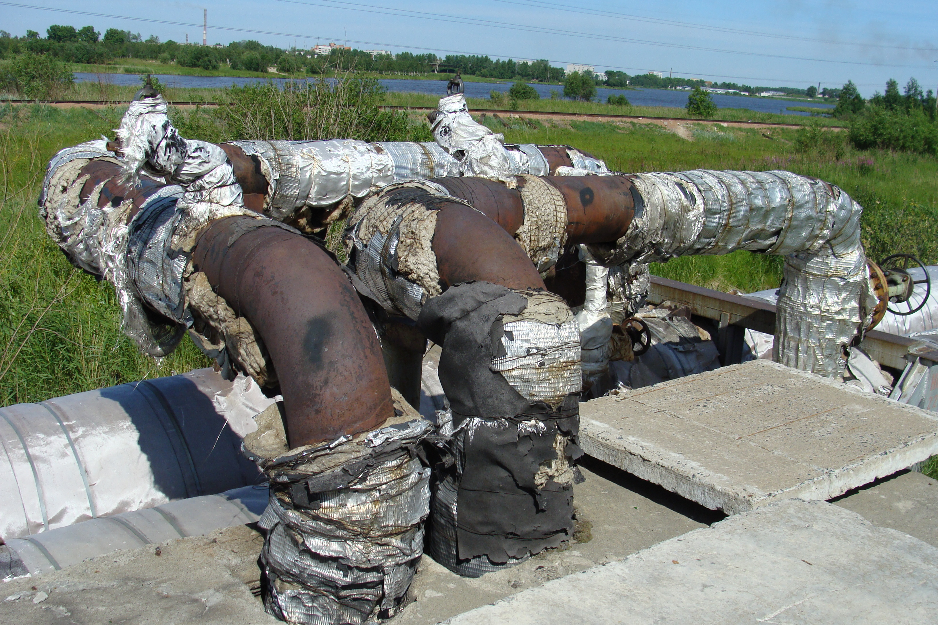 Дефекты изоляции.